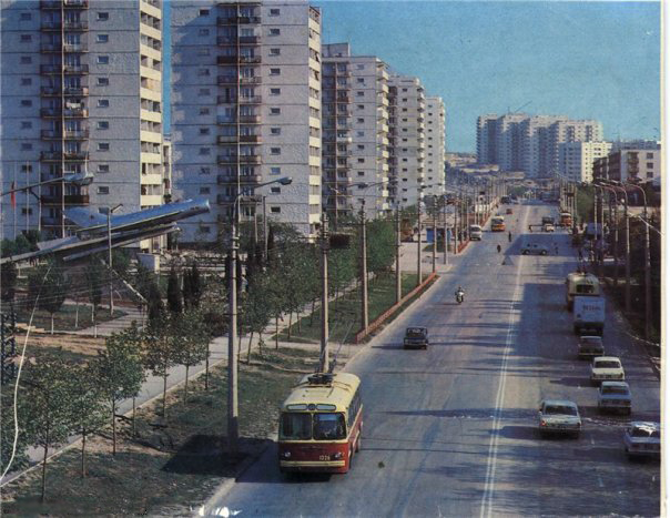 Острякова, 70е